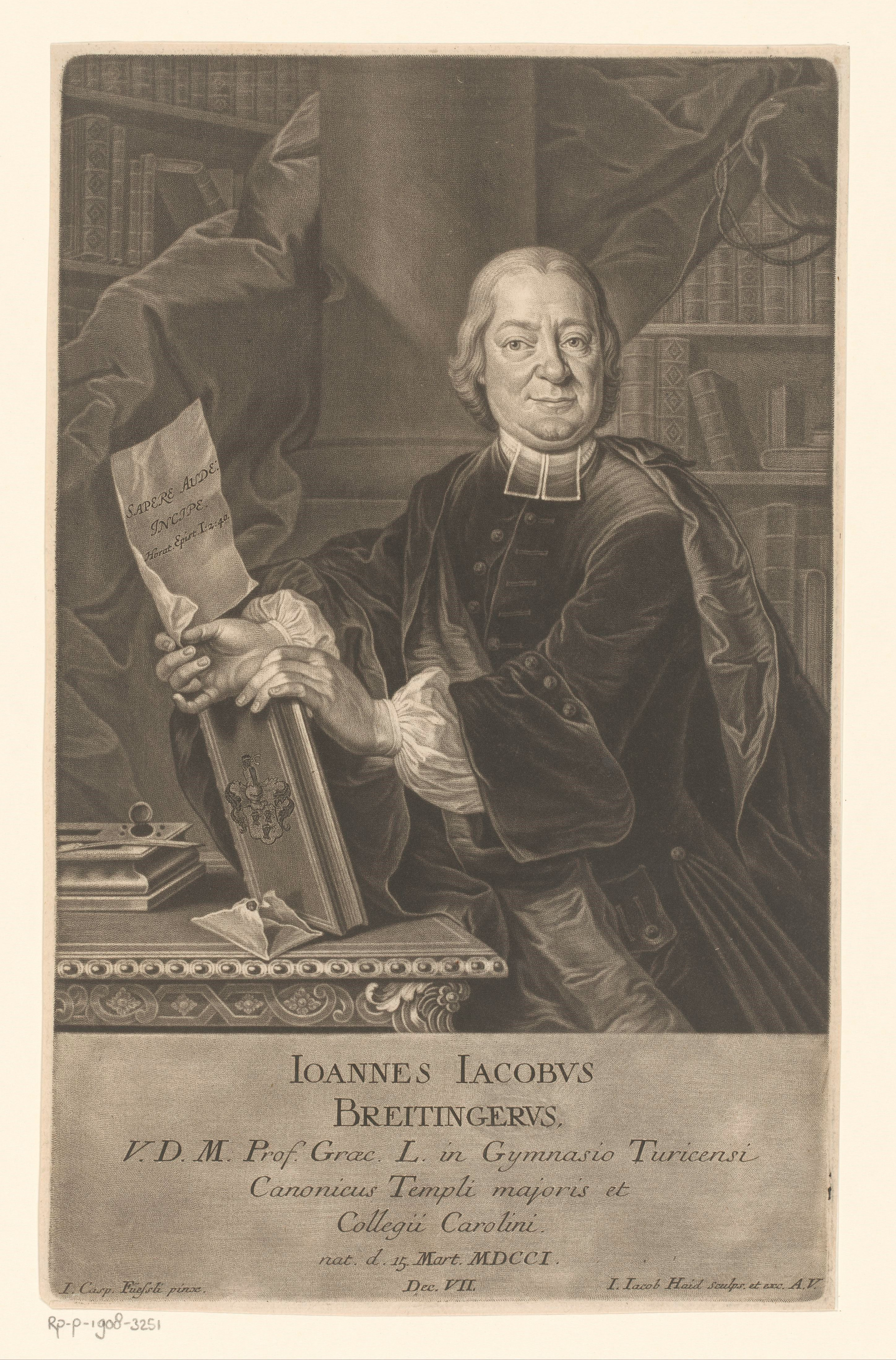 IdentificatieTitel(s): Portret van Johann Jakob BreitingerObjecttype: prent Objectnummer: RP-P-1908-3251Catalogusreferentie: HAB A 2794Opschriften / Merken: verzamelaarsmerk, verso, gestempeld: Lugt 2228Omschrijving: Met onderschrift in het Latijn.VervaardigingVervaardiger: prentmaker: Johann Jacob Haid (vermeld op object)naar schilderij van: Johann Caspar Füssli (vermeld op object)uitgever: Johann Jacob Haid (vermeld op object)Plaats vervaardiging: AugsburgDatering: 1714 - 1767Materiaal: papier Techniek: mezzotint / etsenAfmetingen: plaatrand: h 321 mm × b 200 mmToelichtingPrent gebruikt voor: Brucker, Jacob. Bildersal heutiges Tages lebender und durch Gelahrtheit berühmter Schrifftsteller. Augsburg: Johann Jacob Haid, 1748.OnderwerpWat: historical personsbookshelvesletter, envelopeWie: Johann Jakob BreitingerVerwerving en rechtenVerwerving: aankoop 1905Copyright: Publiek domein